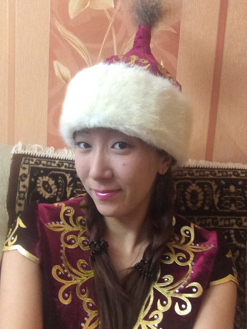 Саукеле - свадебный головной убор казахских женщин